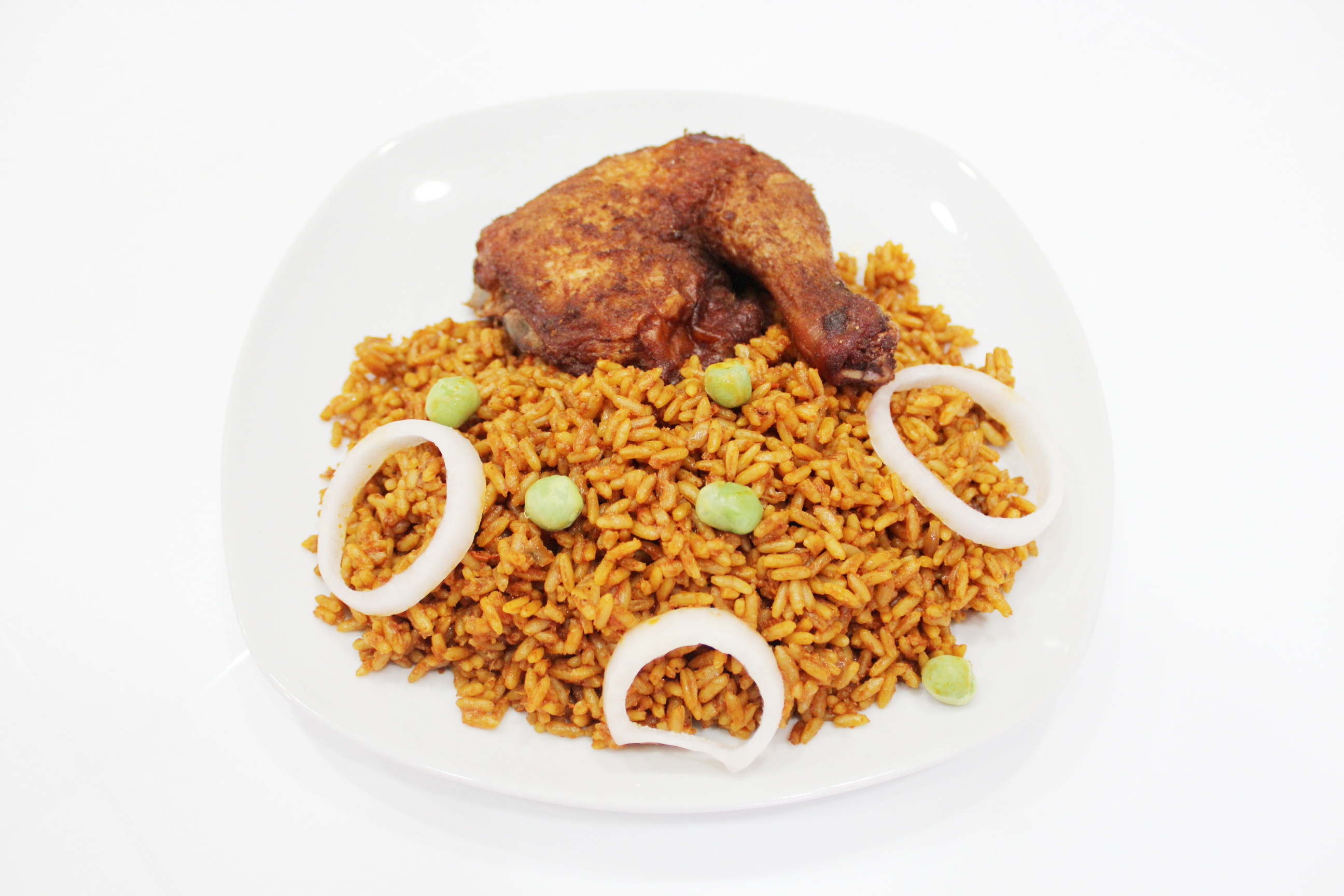 NIGERIAN